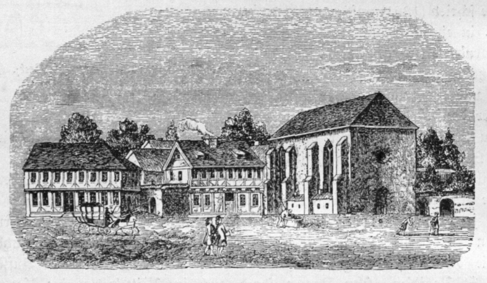 Der Tempelhof am Bohlweg in Braunschweig mit Matthäuskapelle